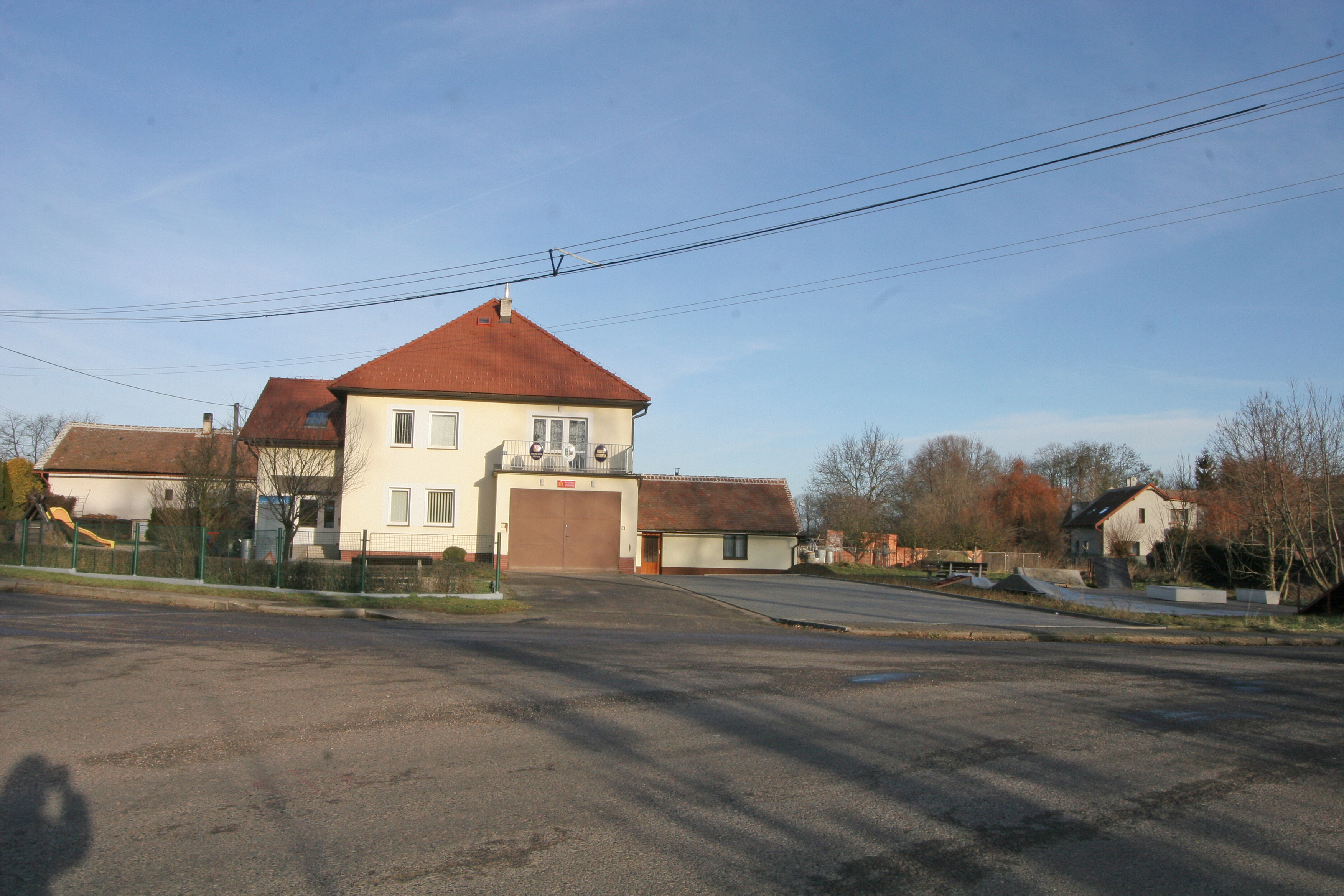 Dřenice obecní úřad